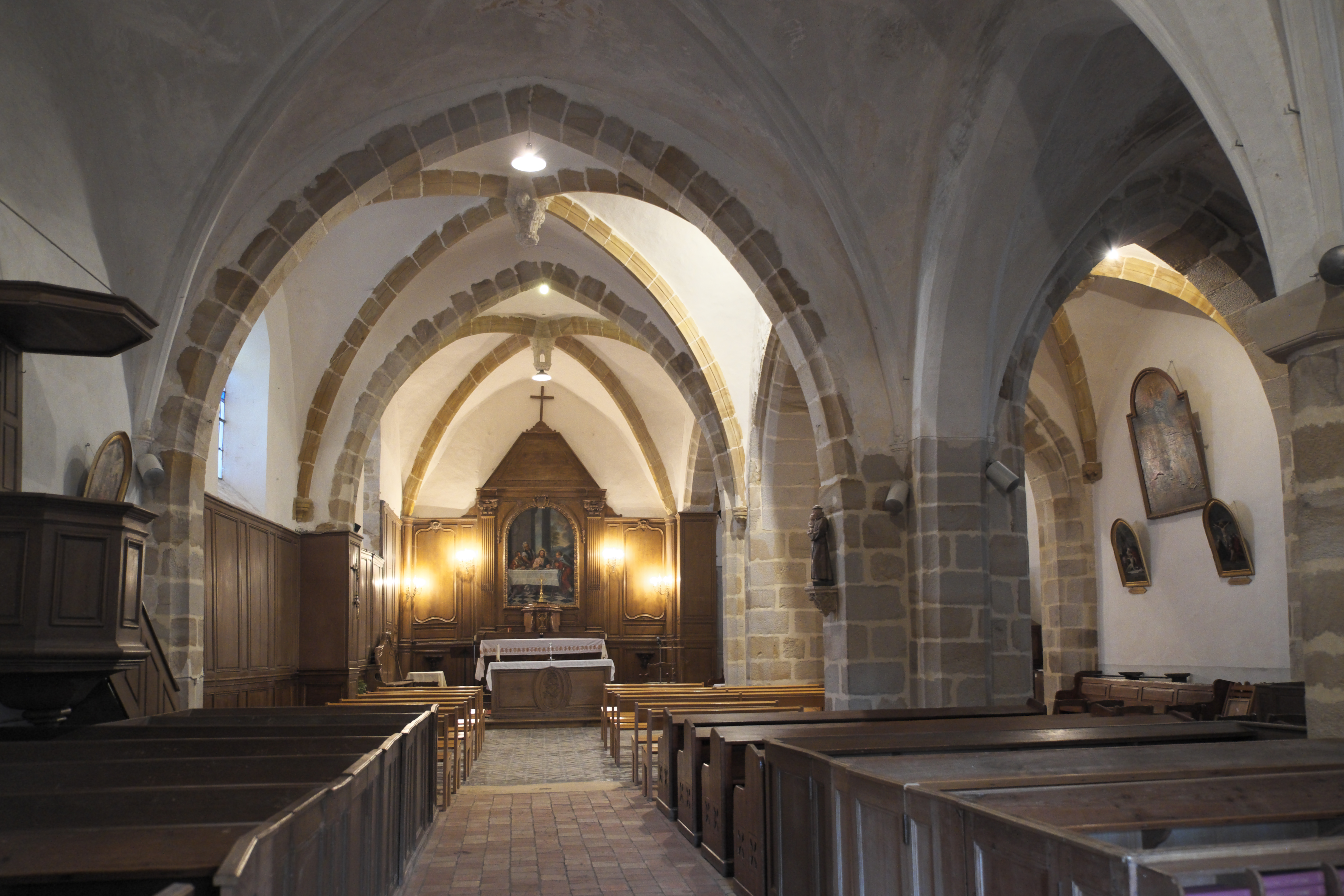 Katholische Kirche Saint-Germain in Gometz-la-Ville im Département Essonne (Île-de-France/Frankreich), Innenraum